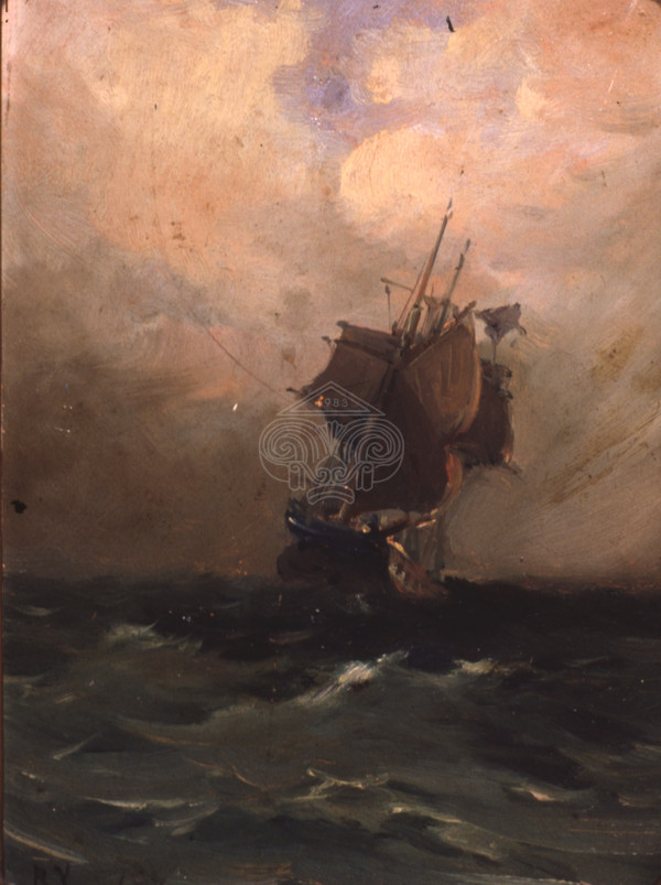 Sailing ship